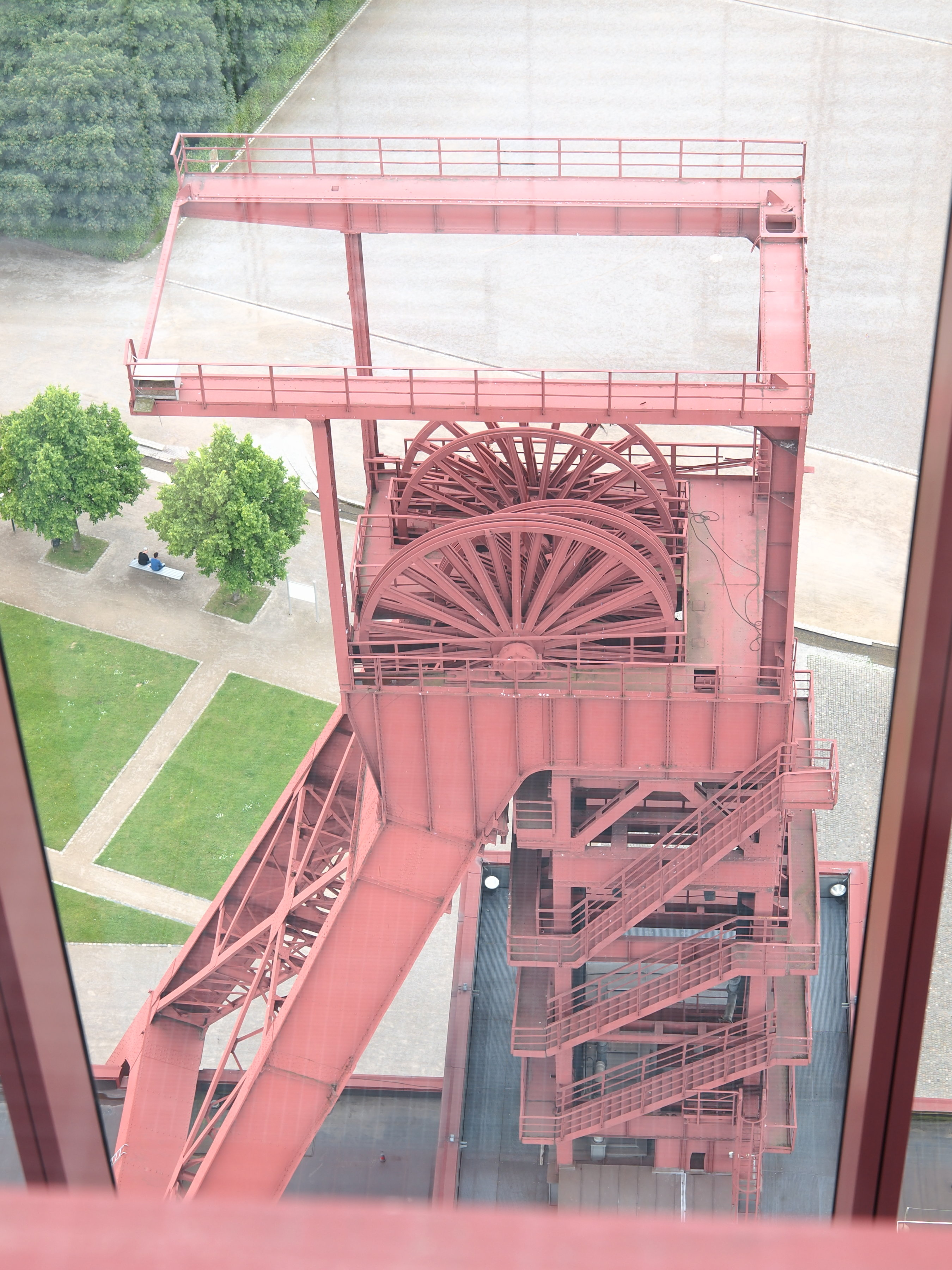 Zeche Nordstern, Gelsenkirchen, Blick vom Förderturm von Schacht 2 nach W auf das Fördergerüst von Schacht 1